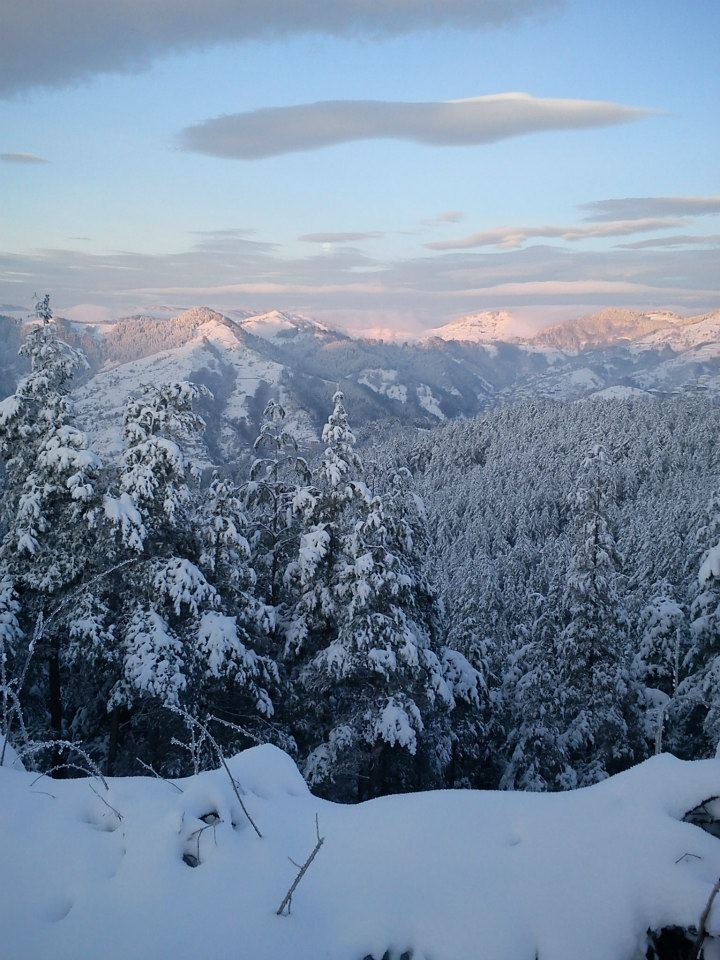 Зимен пейзаж от Гърнати